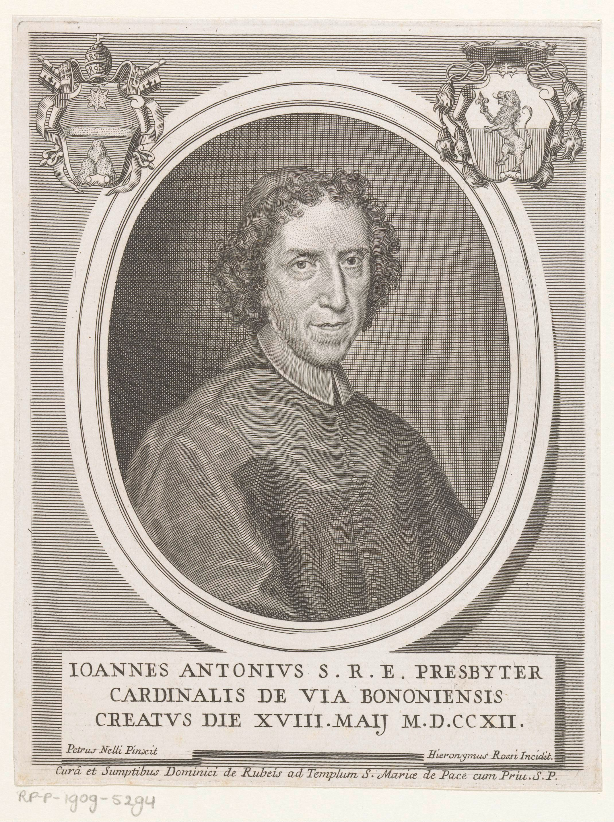 IdentificatieTitel(s): Portret van kardinaal Gianantonio DaviaObjecttype: prent Objectnummer: RP-P-1909-5294Opschriften / Merken: verzamelaarsmerk, verso, gestempeld: Lugt 2228VervaardigingVervaardiger: prentmaker: Girolamo Rossi (II) (vermeld op object)naar schilderij van: Pietro Nelli (vermeld op object)uitgever: Domenico de'Rossi (vermeld op object)verlener van privilege: Pauselijk hof (vermeld op object)Plaats vervaardiging: prentmaker: Romenaar schilderij van: Italiëuitgever: Romeverlener van privilege: VaticaanstadDatering: 1712 - 1762Fysieke kenmerken: gravureMateriaal: papier Techniek: graveren (drukprocedé)Afmetingen: plaatrand: h 210 mm × b 159 mmOnderwerpWat: historical personscardinalWie: Gianantonio DaviaVerwerving en rechtenVerwerving: aankoop 1905Copyright: Publiek domein